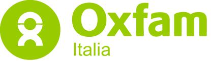 Oxfam italia